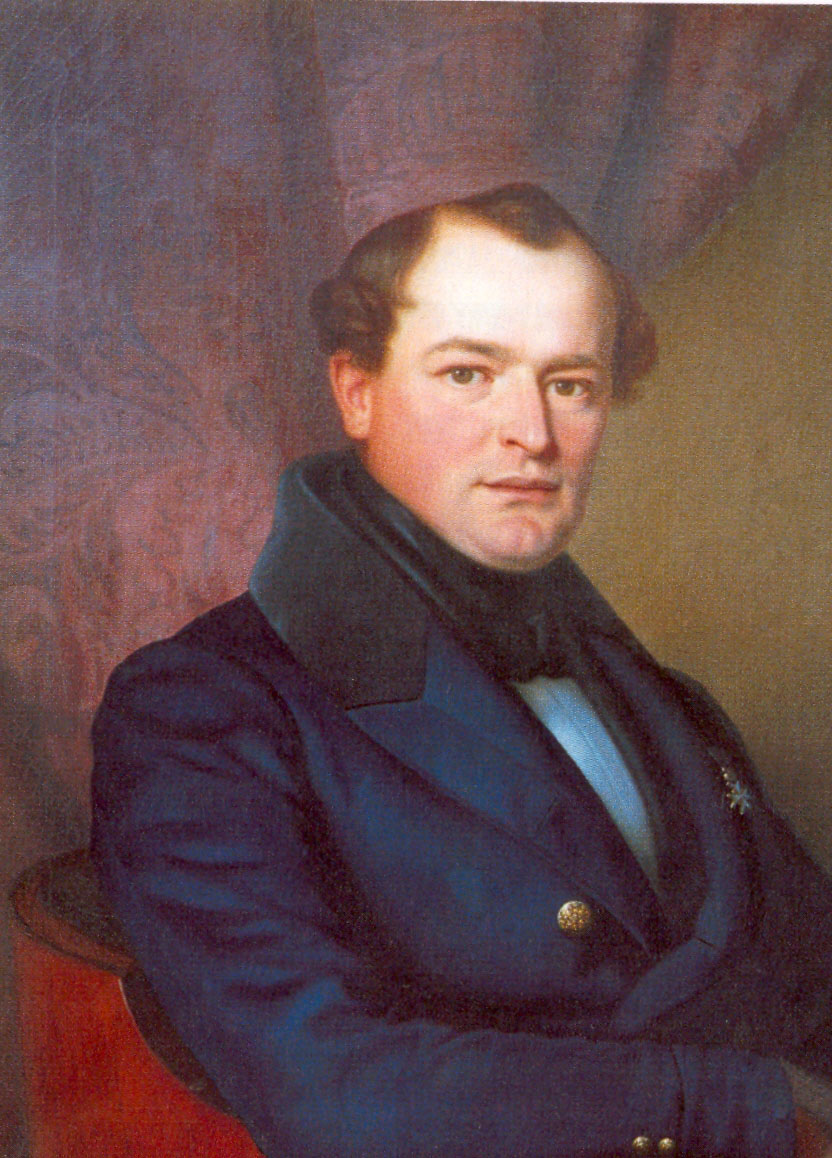 Erbgraf Constantin von Waldburg-Zeil-Trauchburg (1807 – 1862) Ölgemälde